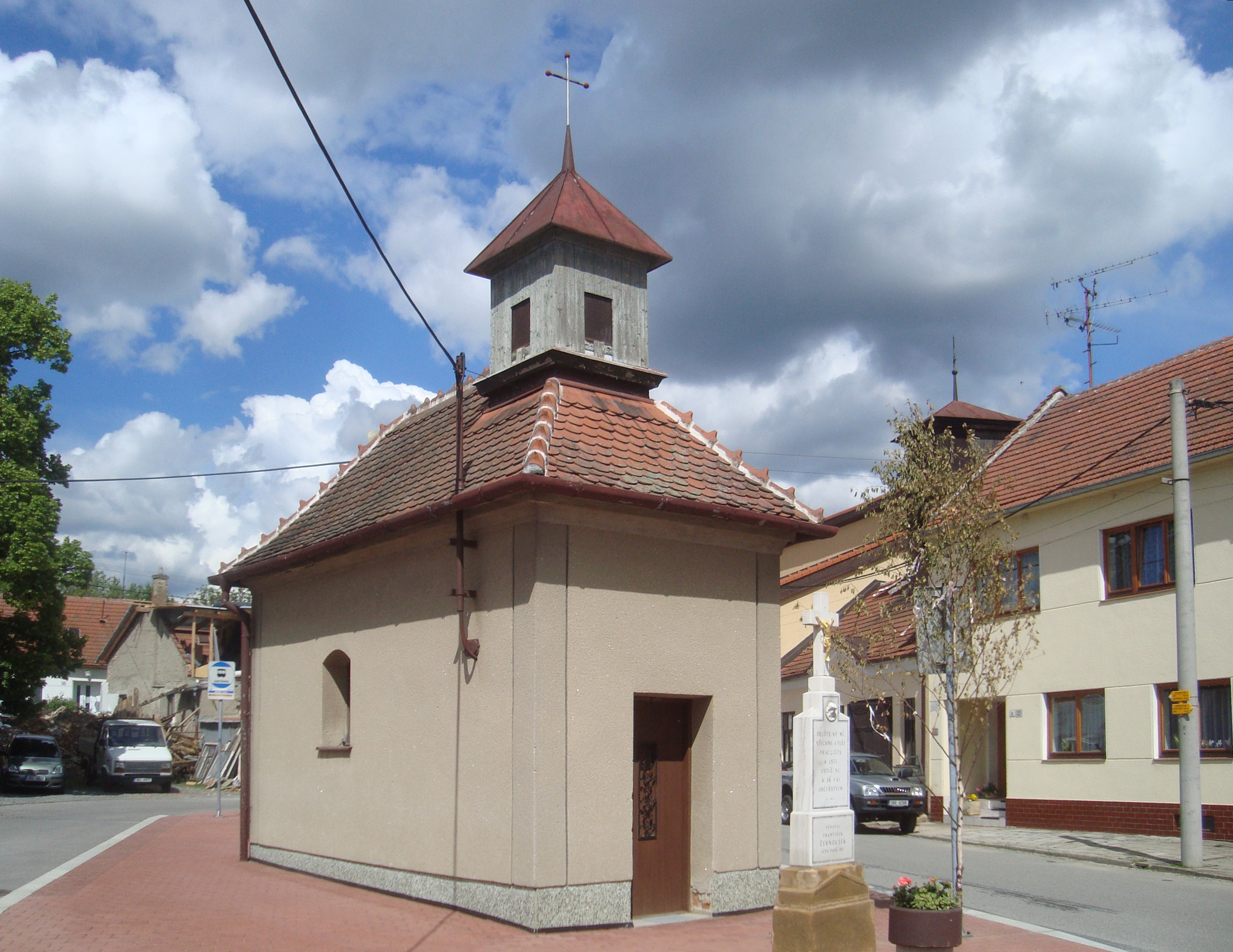 Popůvky kaplička